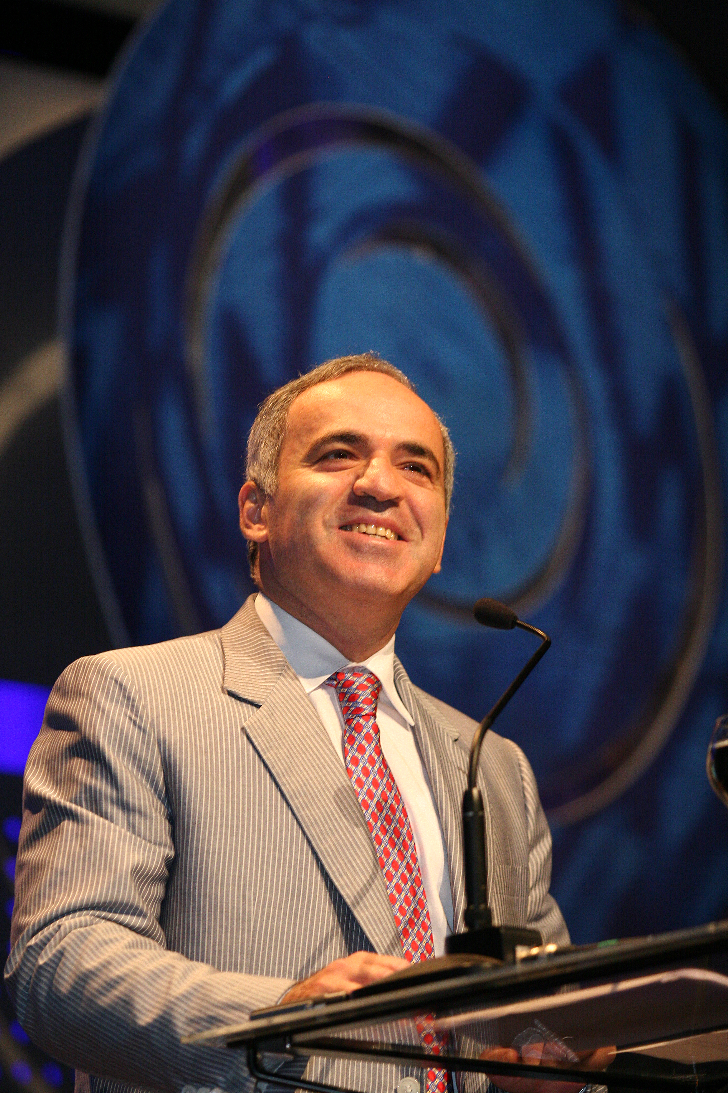 Garry Kasparov no Fronteiras do Pensamento Porto Alegre 2011